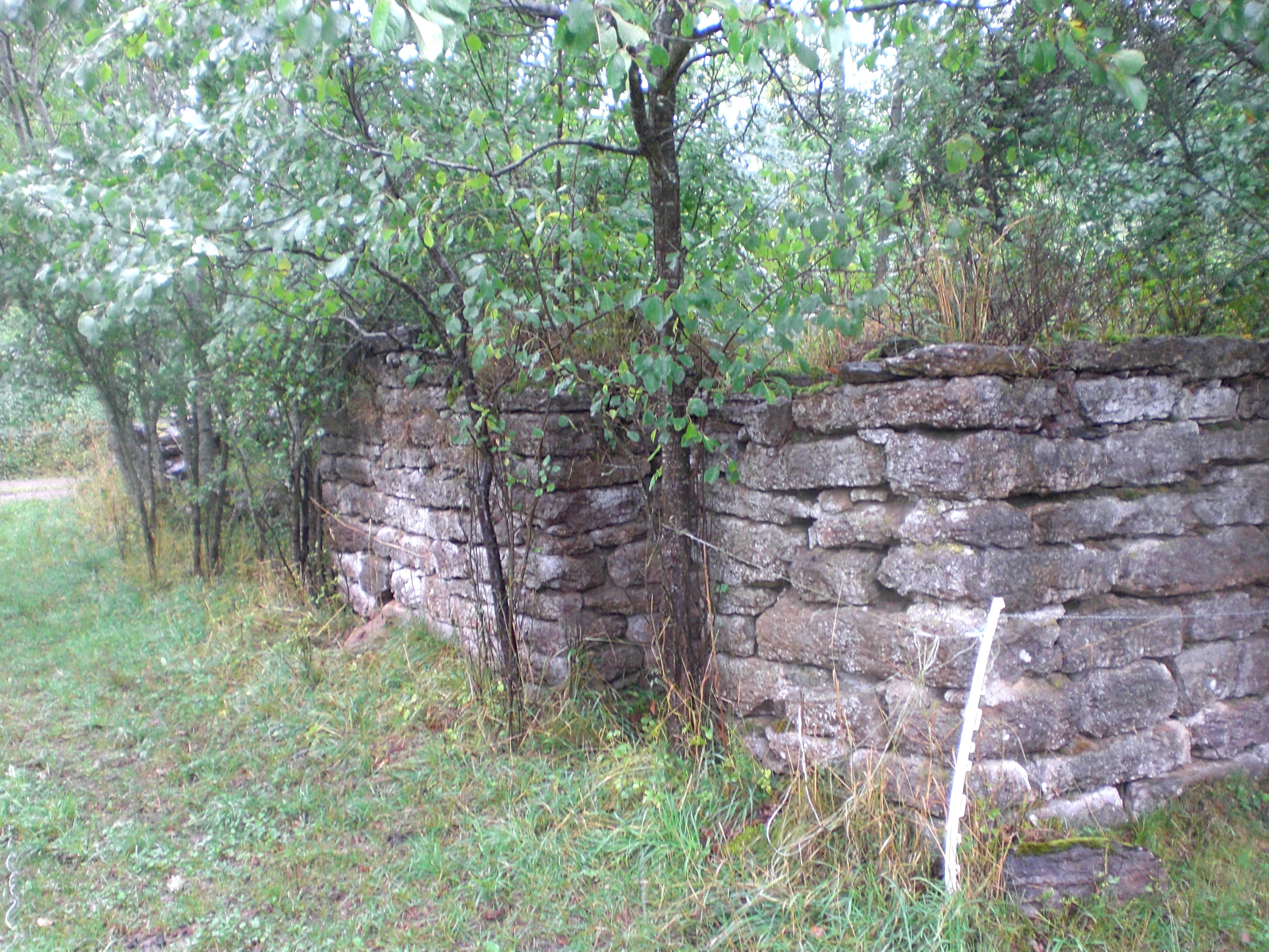 Ruinen in Österskog auf Öland, Schweden